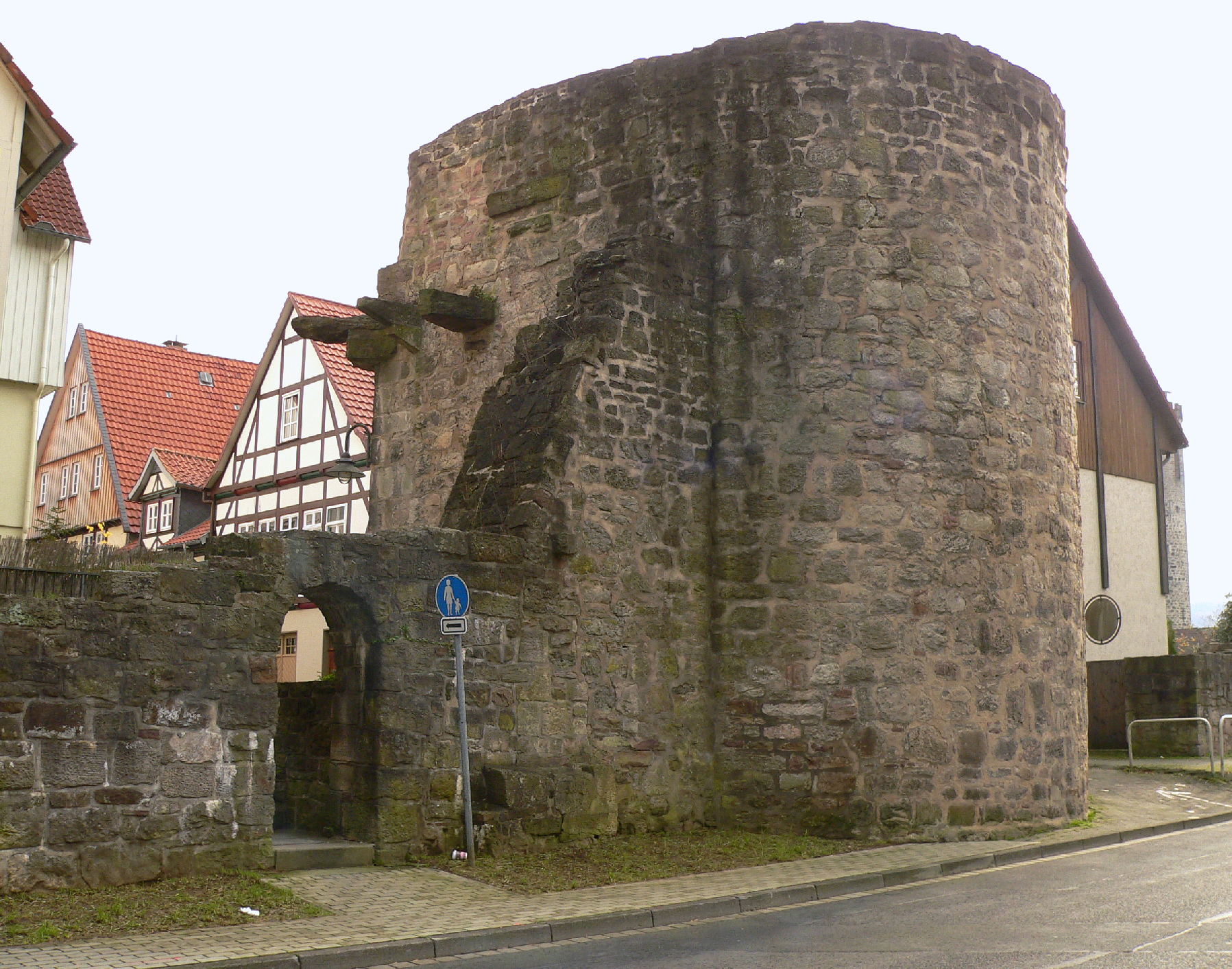 Stumpfeturm mit Stadtmauerrest an der Kasseler Schlagd